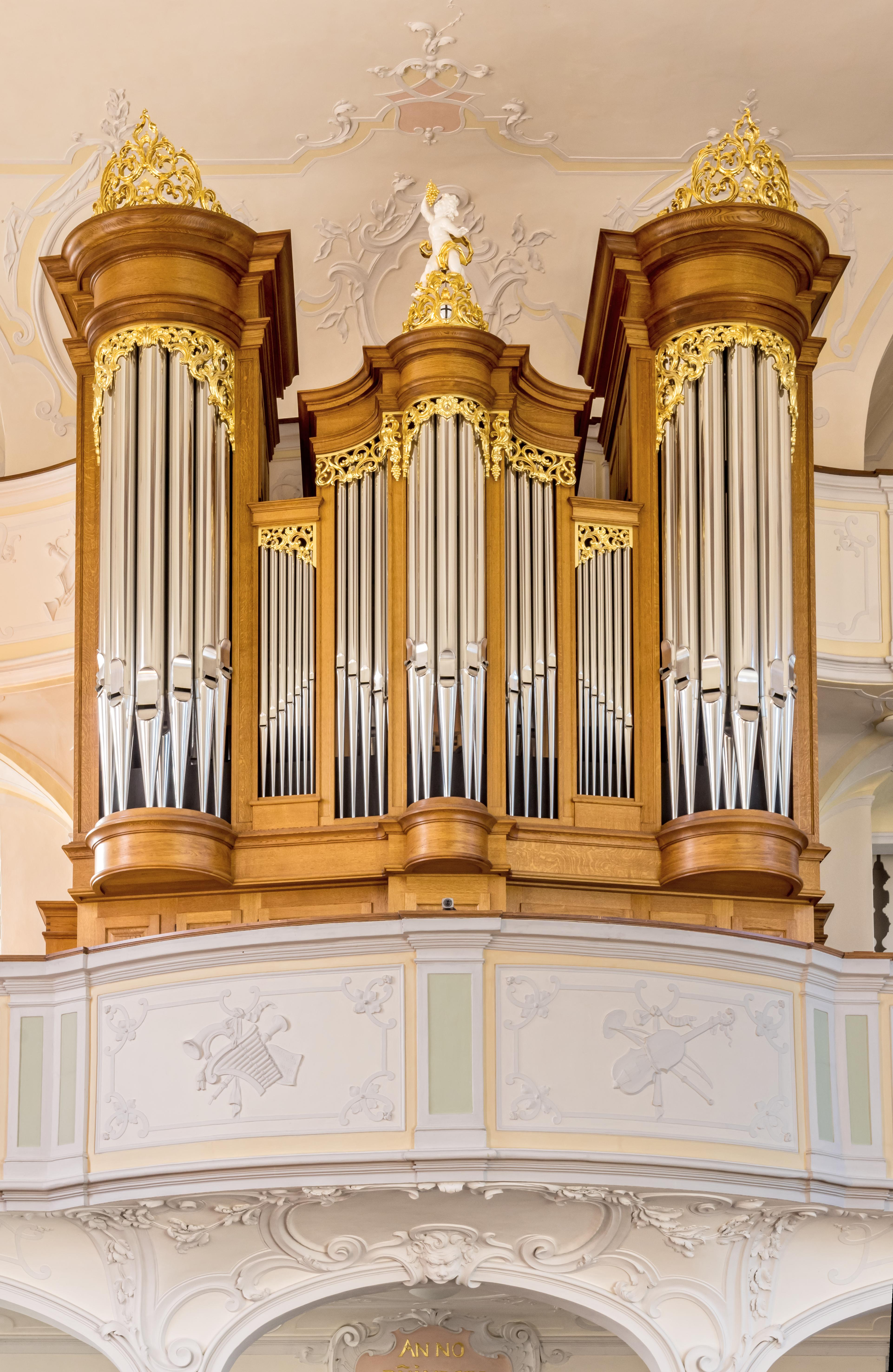 Bilder aus der katholischen Kirche St. Remigius in Merdingen St. Remigius